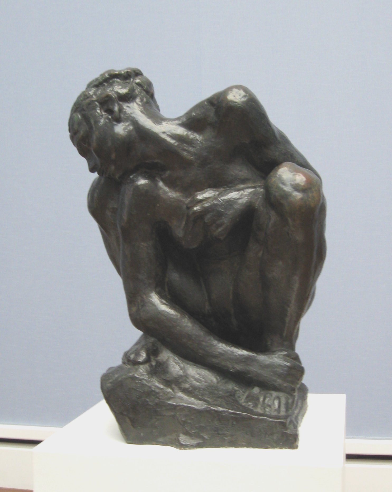 Auguste Rodin: Kauernde, 1880-82, Neue Pinakothek München